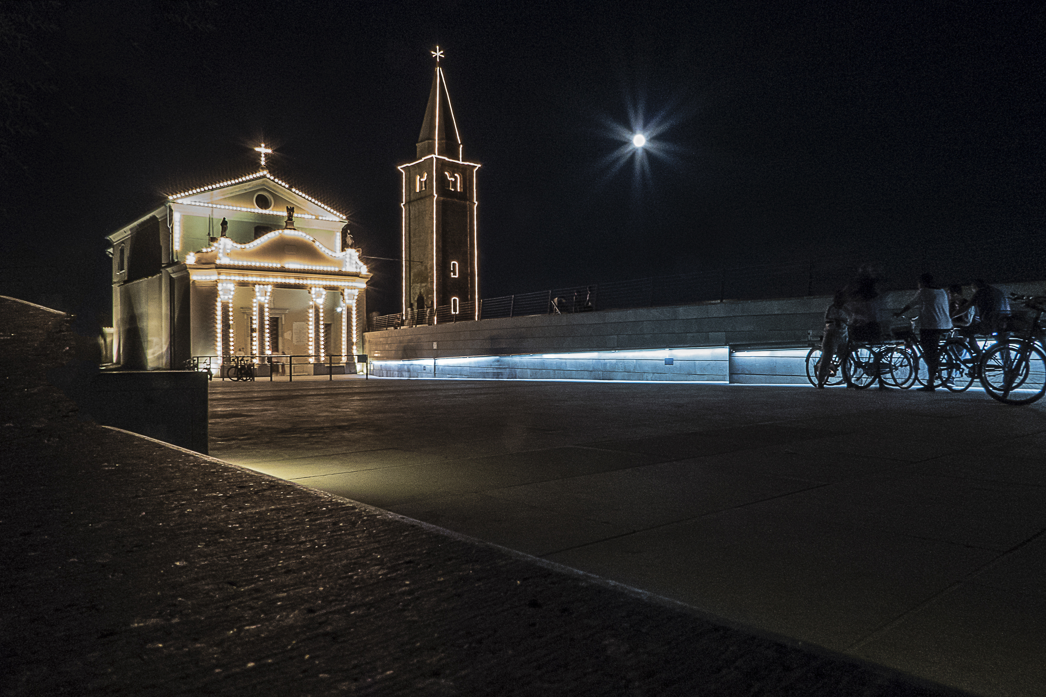 Santuario sulla riva del mare a Caorle This is a photo of a monument which is part of cultural heritage of Italy.